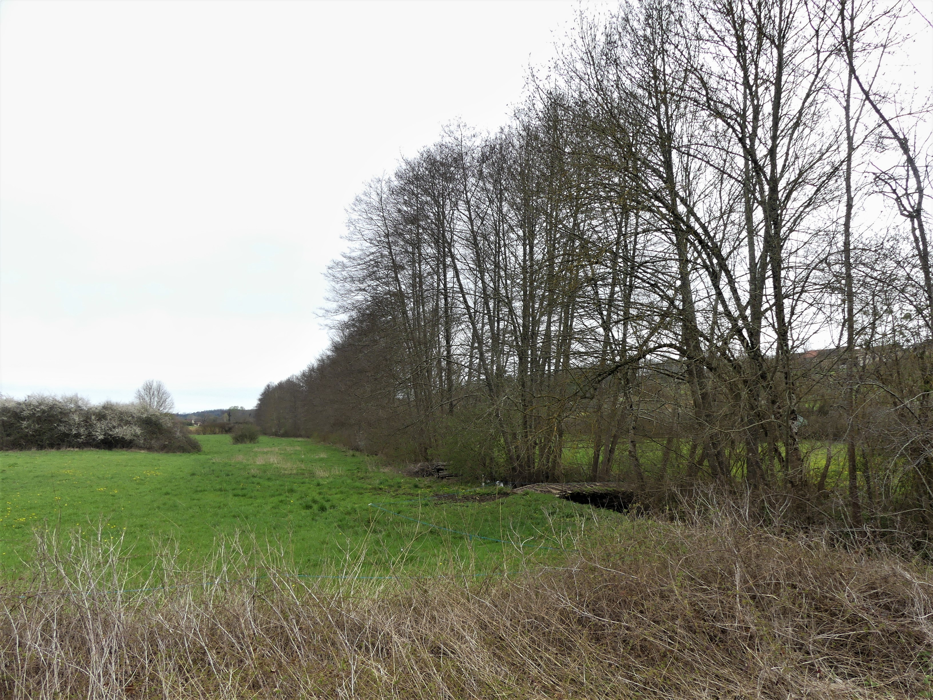 La vallée de la Crempse au nord du lieu-dit la Garnerie, Beleymas, Dordogne, France. Vue prise en direction de l'amont.